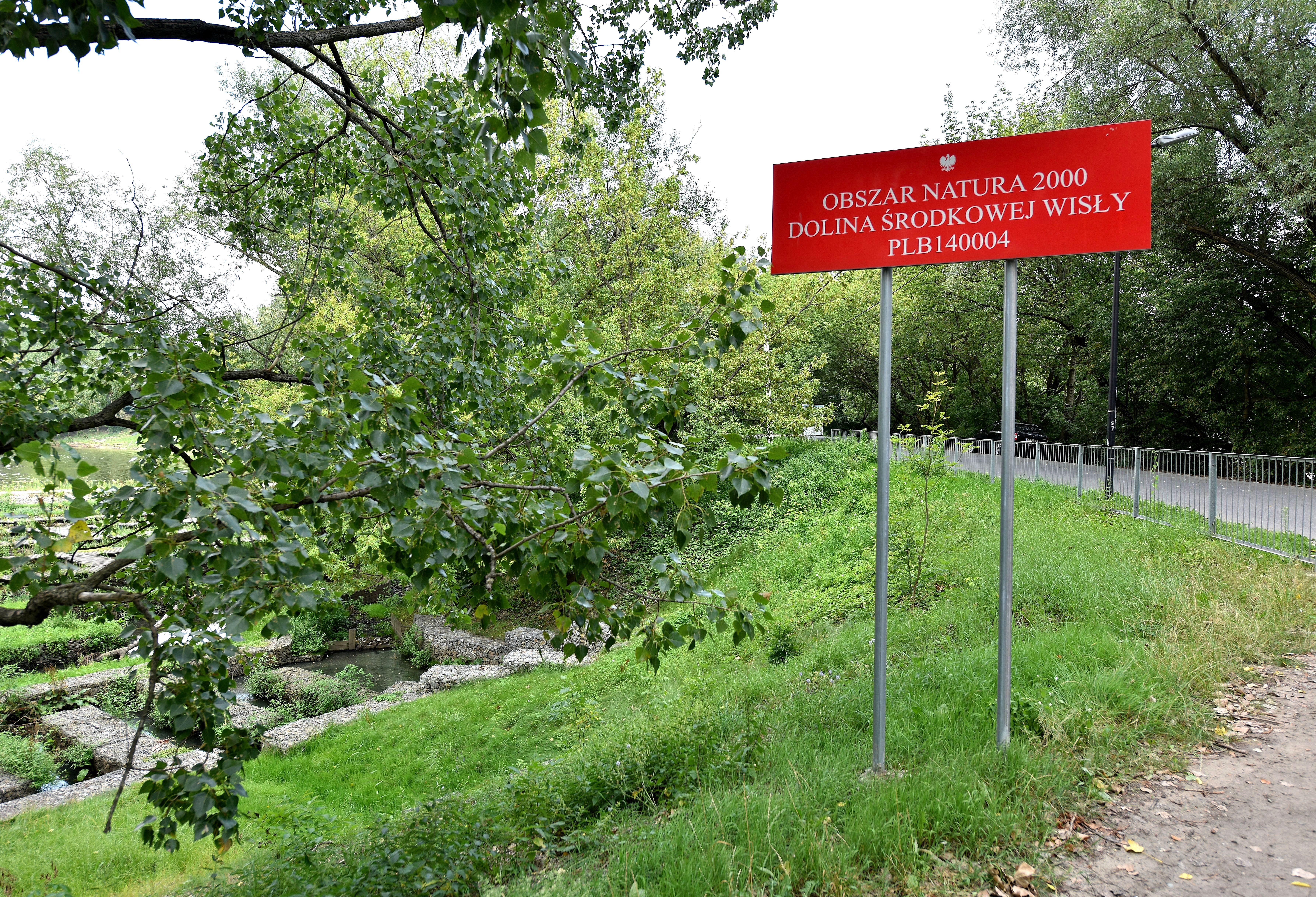 Tablica informująca o obszarze Natura 2000 Dolina Środkowej Wisły przy ul. Zaruskiego w Warszawie